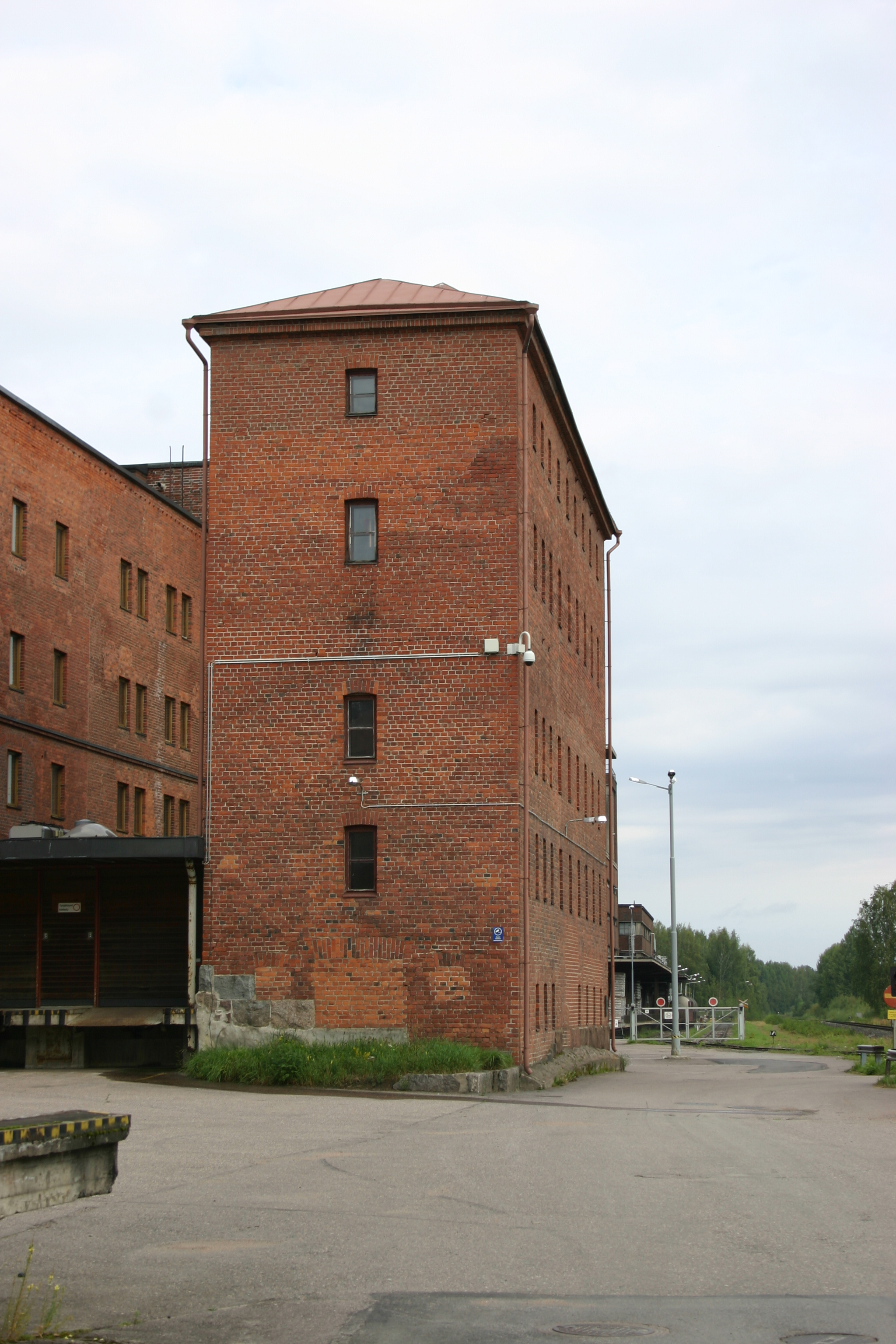 Rajamäen tehdasmuseorakennus, "Patakoppi".